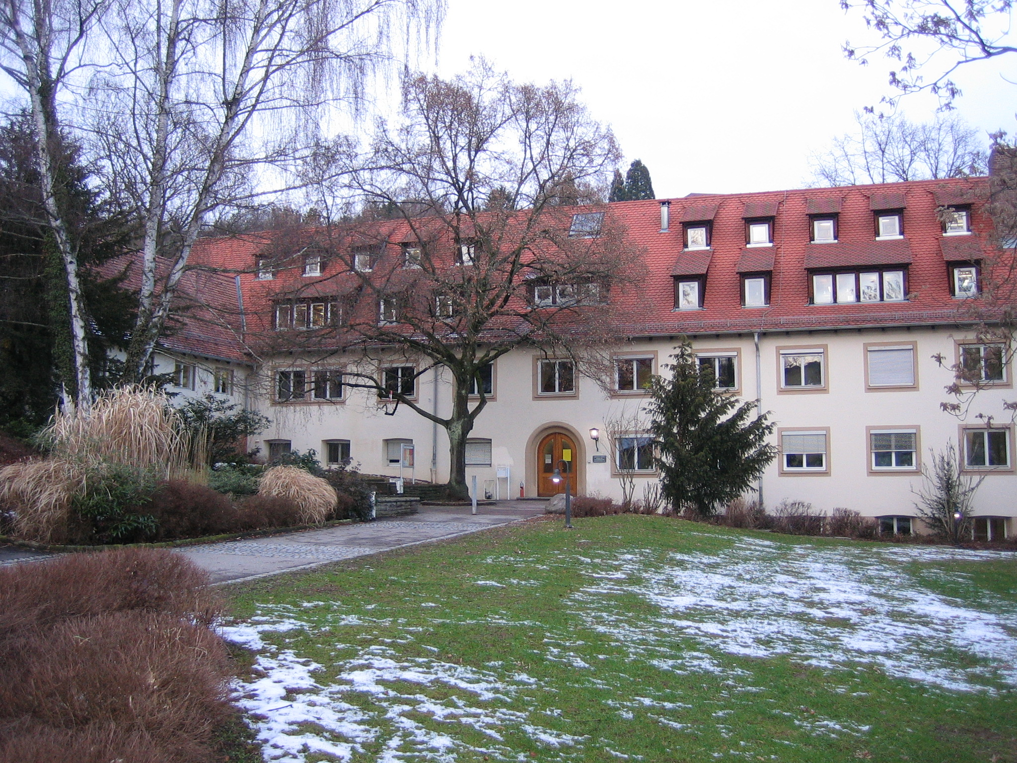 Institut für Politikwissenschft der Universität Tübingen